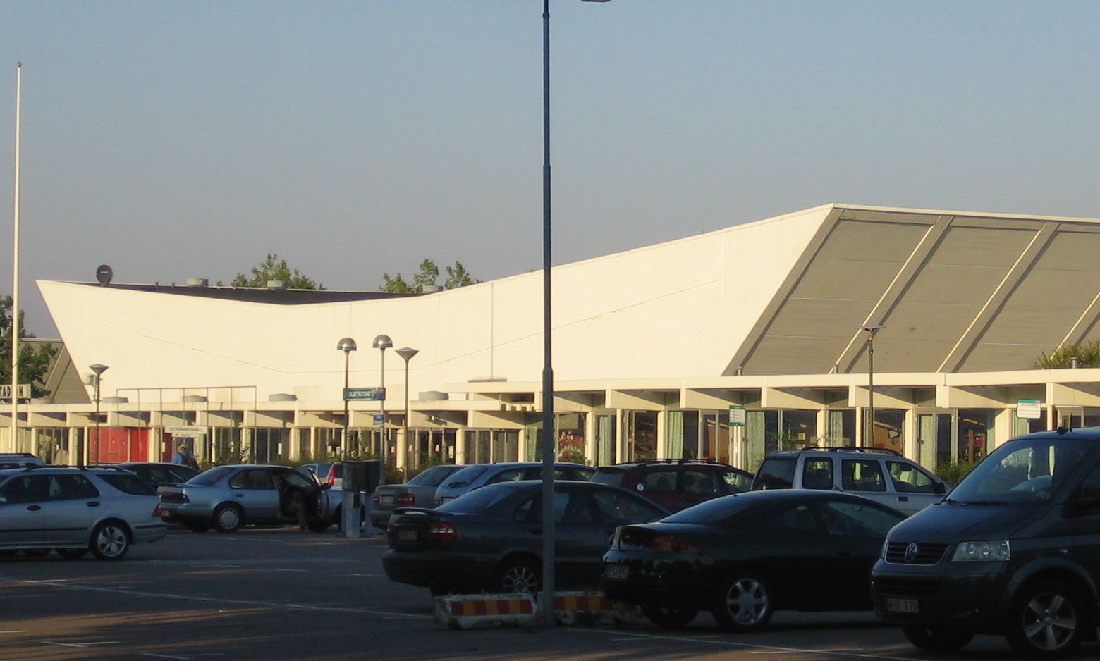 Malmö icehockey stadium